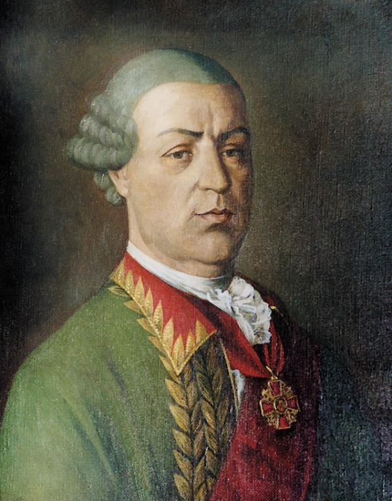 Портрет Івана Рейнсдорпа